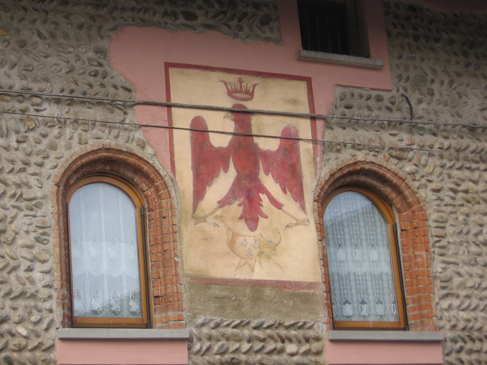 Ghisalba, Bergamo, Italia